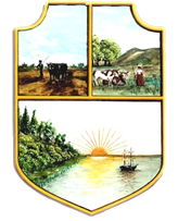 El sello más antiguo está estampado en el contrato celebrado entre San Pedro y el Arq. Pinarolli para la construcción de la iglesia. Con la declaración de ciudad al pueblo de San Pedro en 1907, la municipalidad adoptó otro sello sobre la base de un escudo pintado por Jovita de Oliveira César en ese año, y oficializado el 23 de noviembre por el Honorable Concejo Deliberante de San Pedro (H.C.D.). El emblema es un escudo Heráldico dividido en tres campos. En el cual la parte superior se divide en dos áreas. En la parte superior derecha, un agricultor con un arreo de bueyes lleva a tiro un arado mancera: es la representación de la Agricultura. En la parte superior izquierda, una pastora junto a dos vacas: representa la Ganadería, y se observa en la parte posterior un grupo de ovejas, esto se debe a que los primeros colonos de nuestro partido fueron Irlandeses. Por último, en la parte inferior, el río, las barrancas y un barco. Parte de la producción agropecuaria de la región a principios del siglo, era canalizado a través de nuestro puerto: representa la actividad Portuaria.